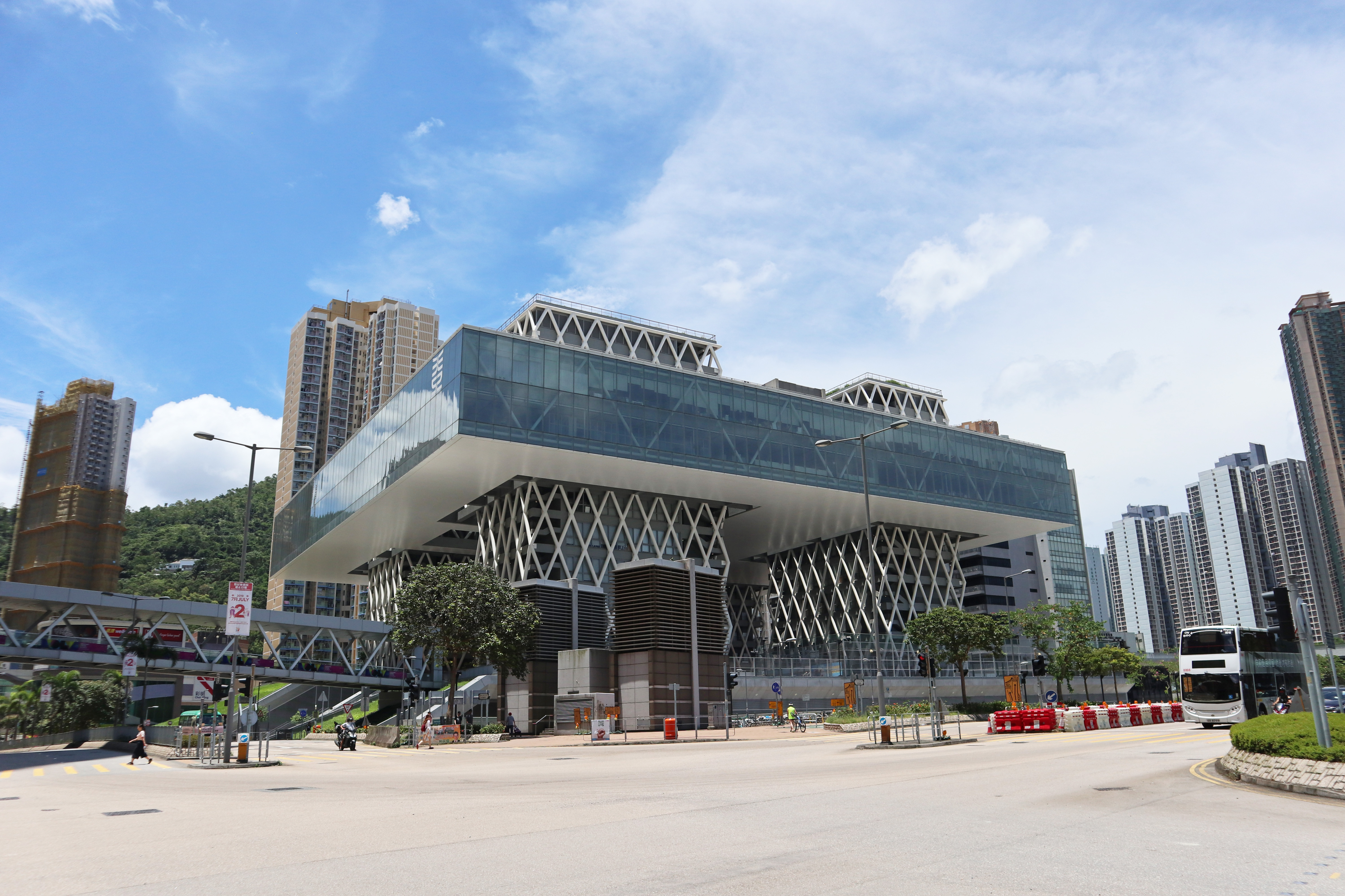 將軍澳調景嶺香港知專設計學院校舍，面向翠嶺路一方